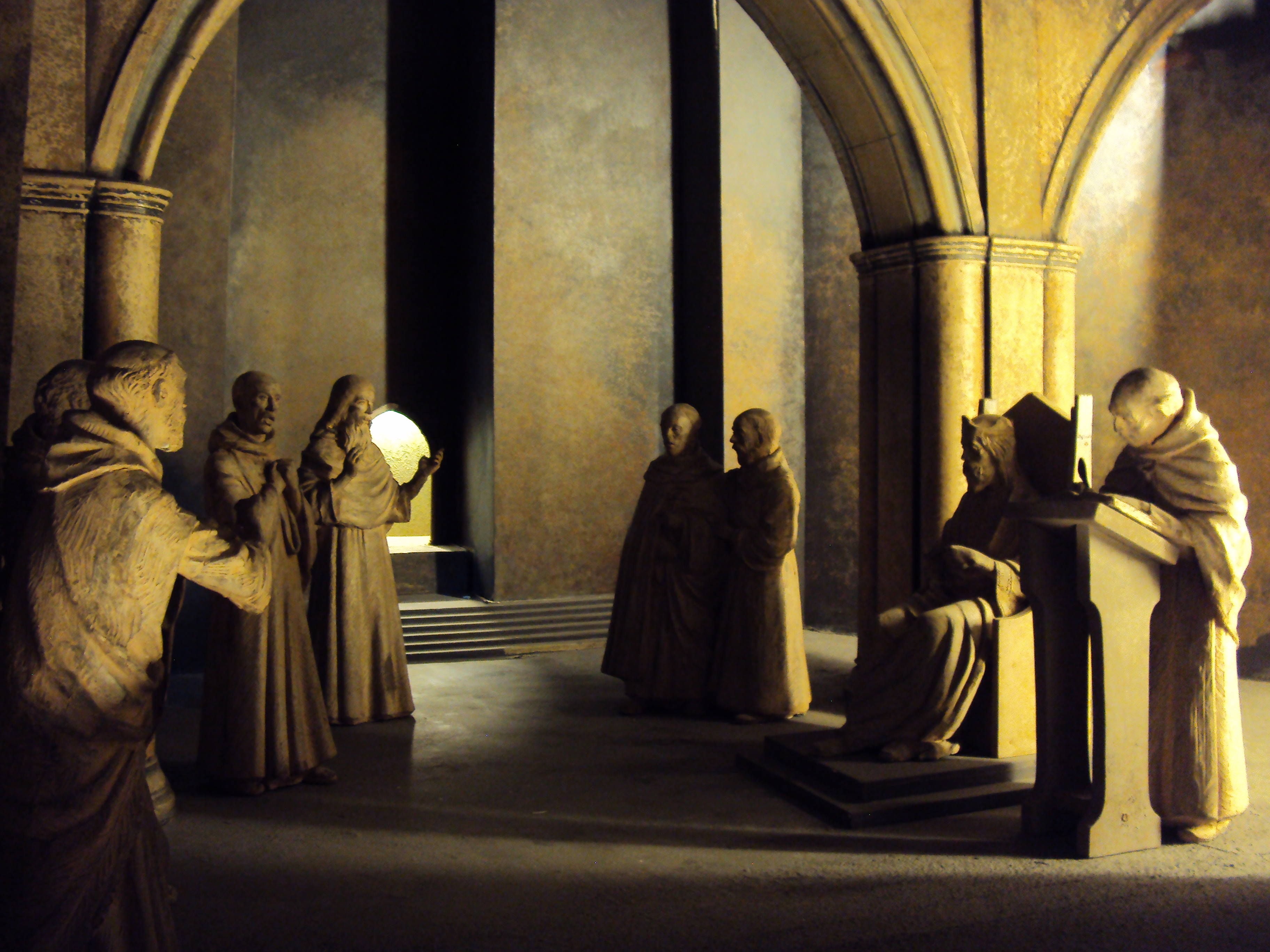 הדמיה של ויכוח הרמב"ן (ויכוח ברצלונה) בתצוגת הקבע של בית התפוצות